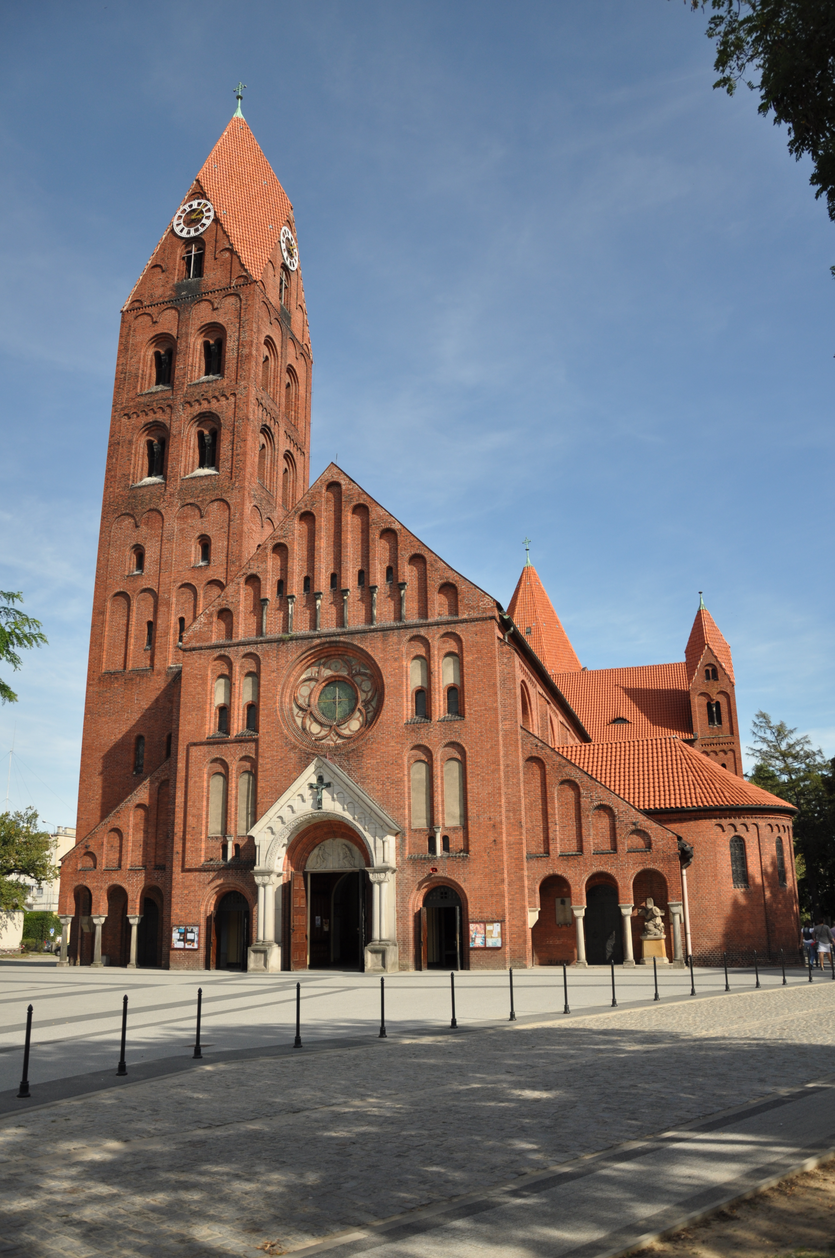 Ostrów Wielkopolski, ul. Gimnazjalna / kardynała Ledóchowskiego - zespół konkatedry: kościół parafialny pw. św. Stanisława BM z lat 1905-1907, grota MB z Lourdes z lat 1928-1933, cmentarz kościelny, murowane ogrodzenie z początku XX w., Dom Katolicki (ul. kardynała Ledóchowskiego 4) z lat 1901-1903, plebania (ul. kardynała Ledóchowskiego 2) z 1904 r., ogród przy plebanii z początku XX w., konwikt arcybiskupi (ul. kardynała Ledóchowskiego 6) z 1905 r., ogród przy konwikcie z początku XX w., wikariat (ul. Gimnazjalna 1) z 1870 r. (zabytek nr 440/Wlkp/A)